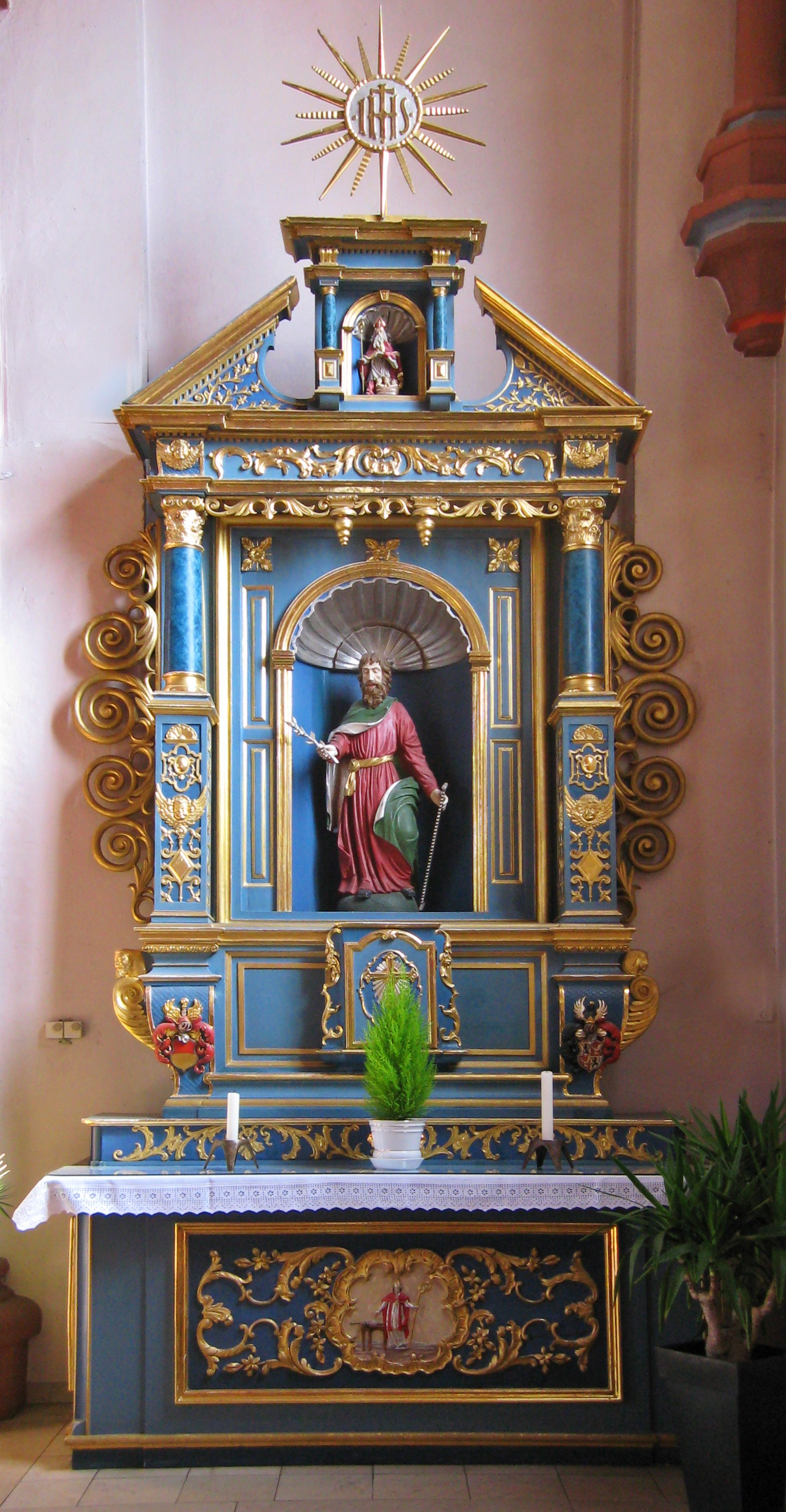 Seitenaltar in St. Maximin in Pachten